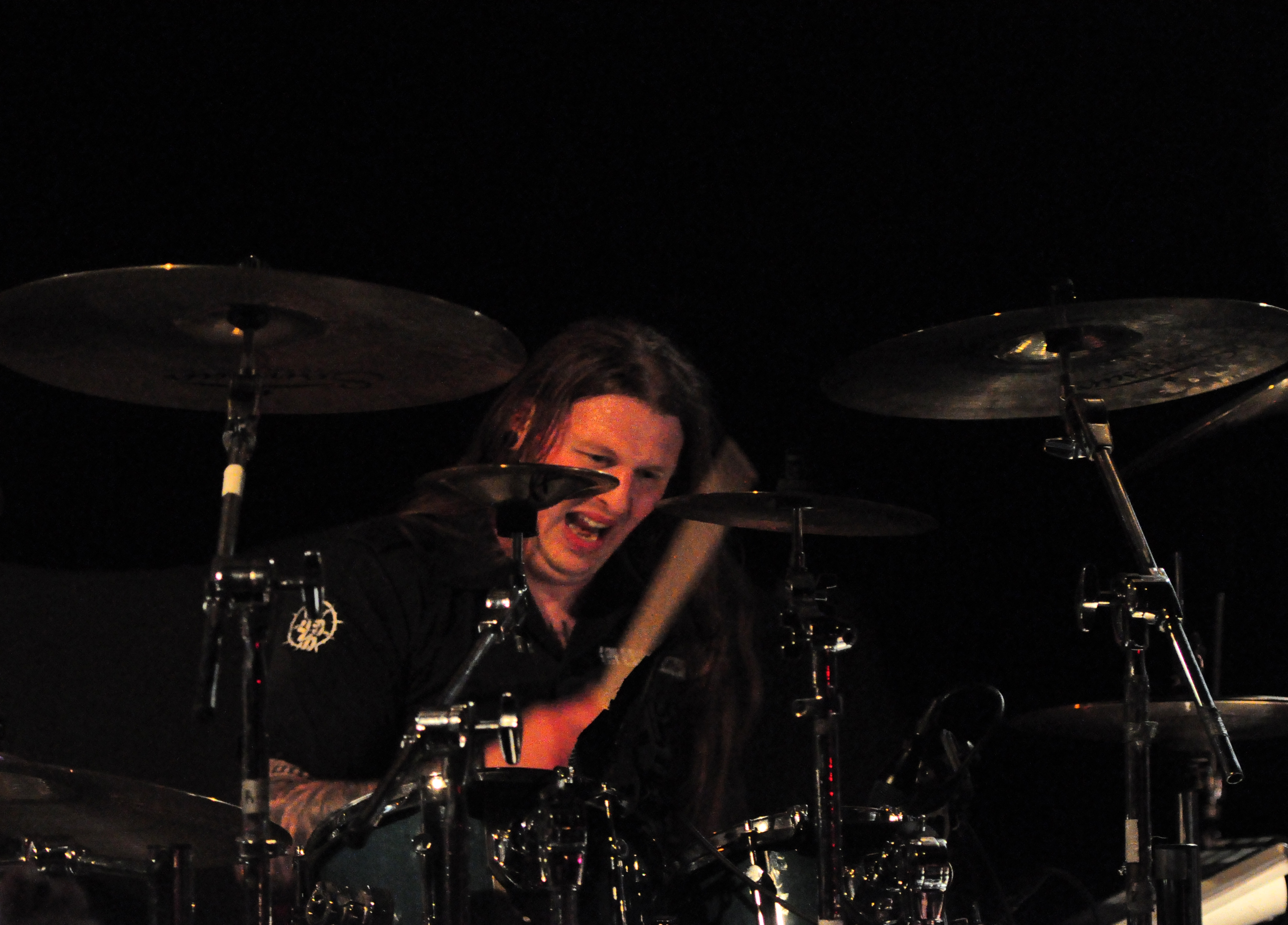 Lay-Down-Rotten-drummer Timo Claas